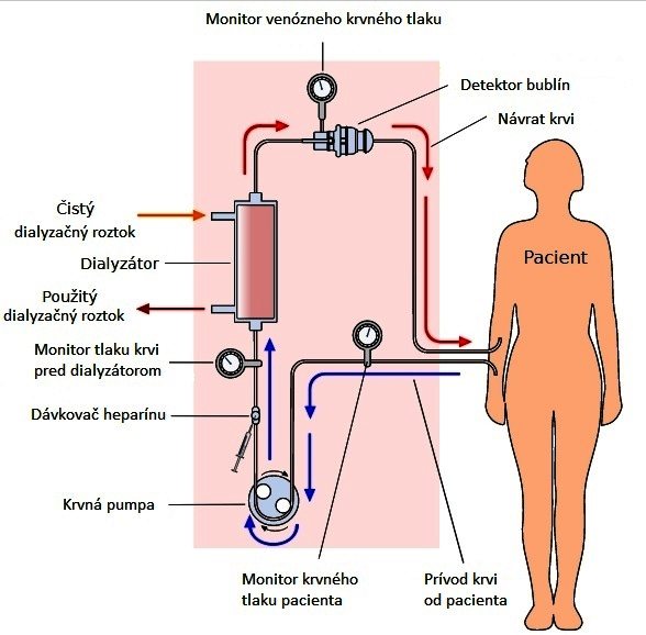 Funkčná schéma hemodialýzy